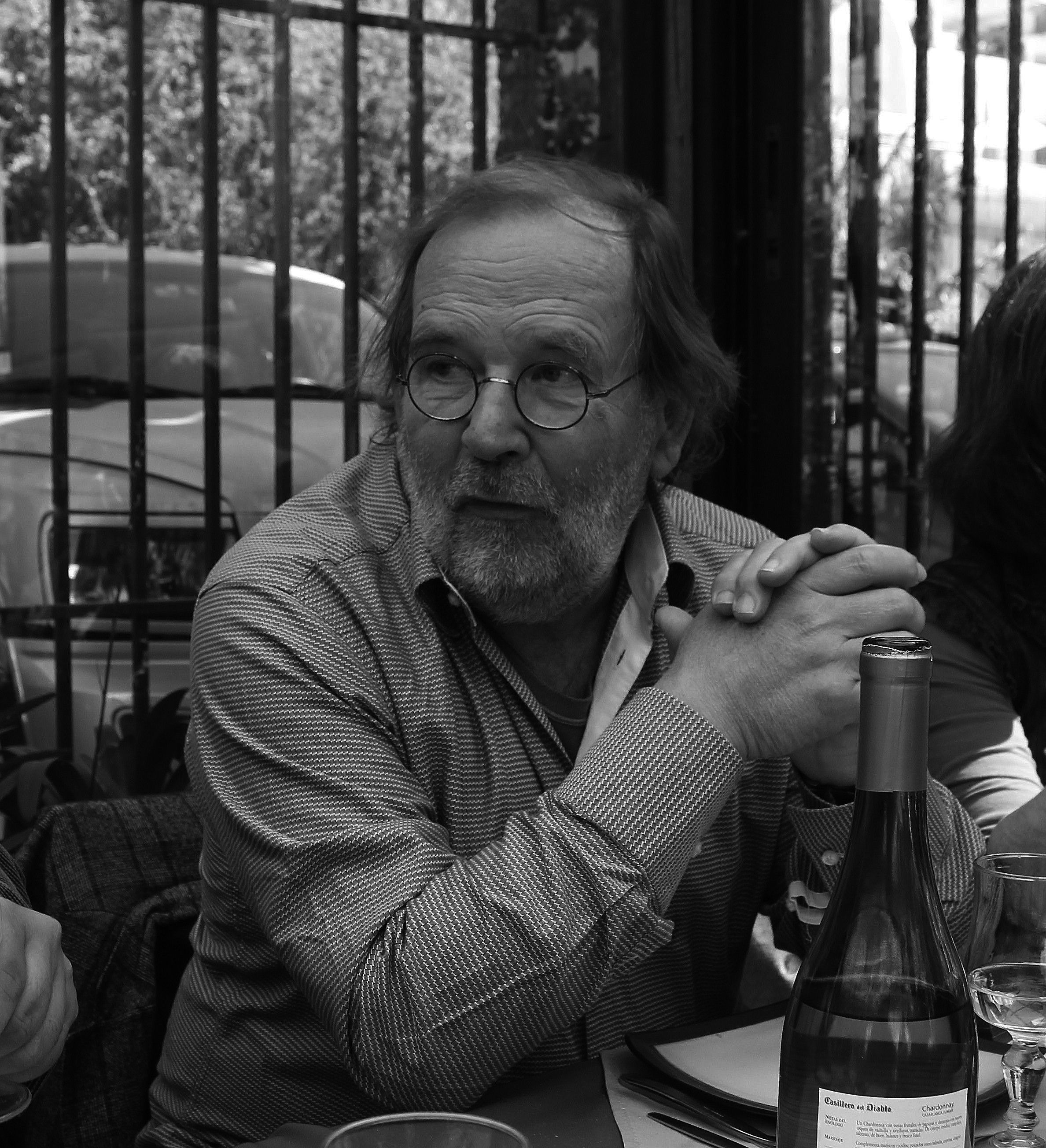 Jean-Louis Déotte à Concón, chili, 2013